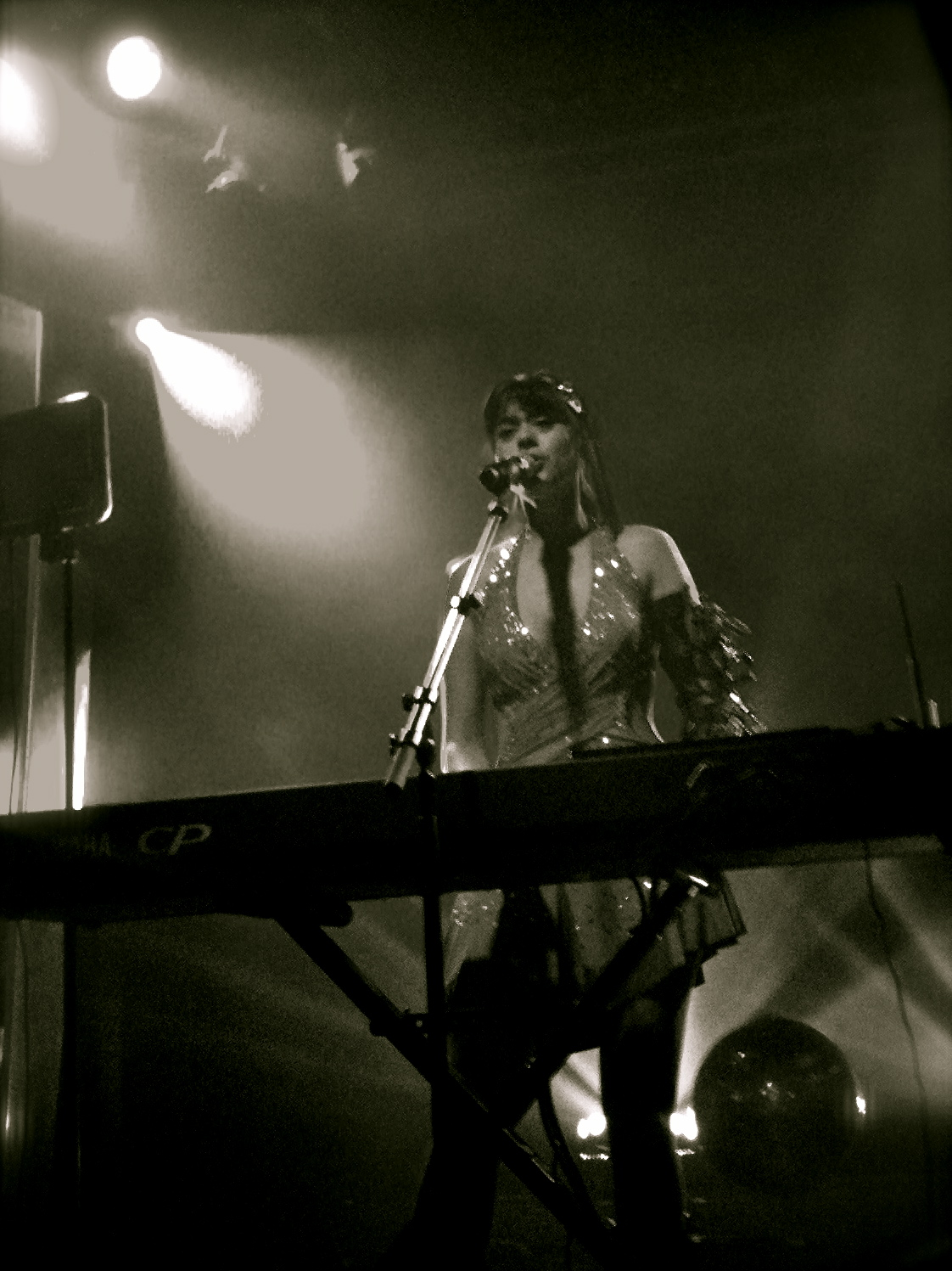 Concert d'Émilie Simon au Point Ephémère le 17 septembre 2009.